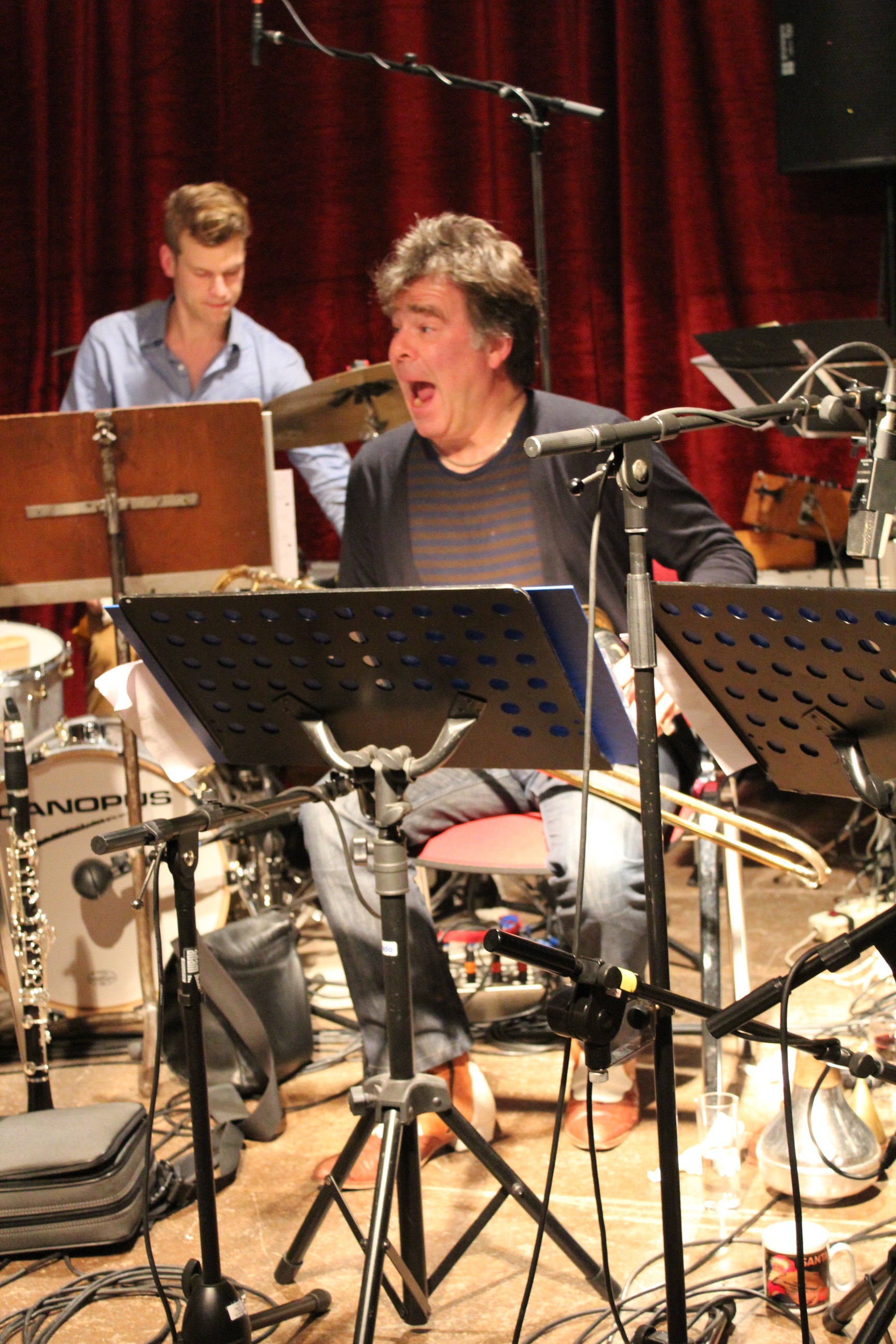 Wolter Wierbos auf dem SWR NEWJazz Meeting im Kölner Loft: „hübsch acht“, mit Carl Ludwig Hübsch - tuba, compositions, Isabelle Duthoit – clarinet, Joris Rühl – clarinet, Matthias Schubert – tenorsax, Wolter Wierbos – trombone, Philip Zoubek – piano, Joker Nies – electronics und Christian Lillinger - drums